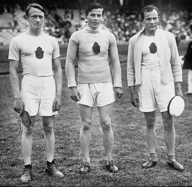 Urho Peltonen, Julius Saaristo ja Väinö Siikaniemi Tukholman olympialaisissa 1912.